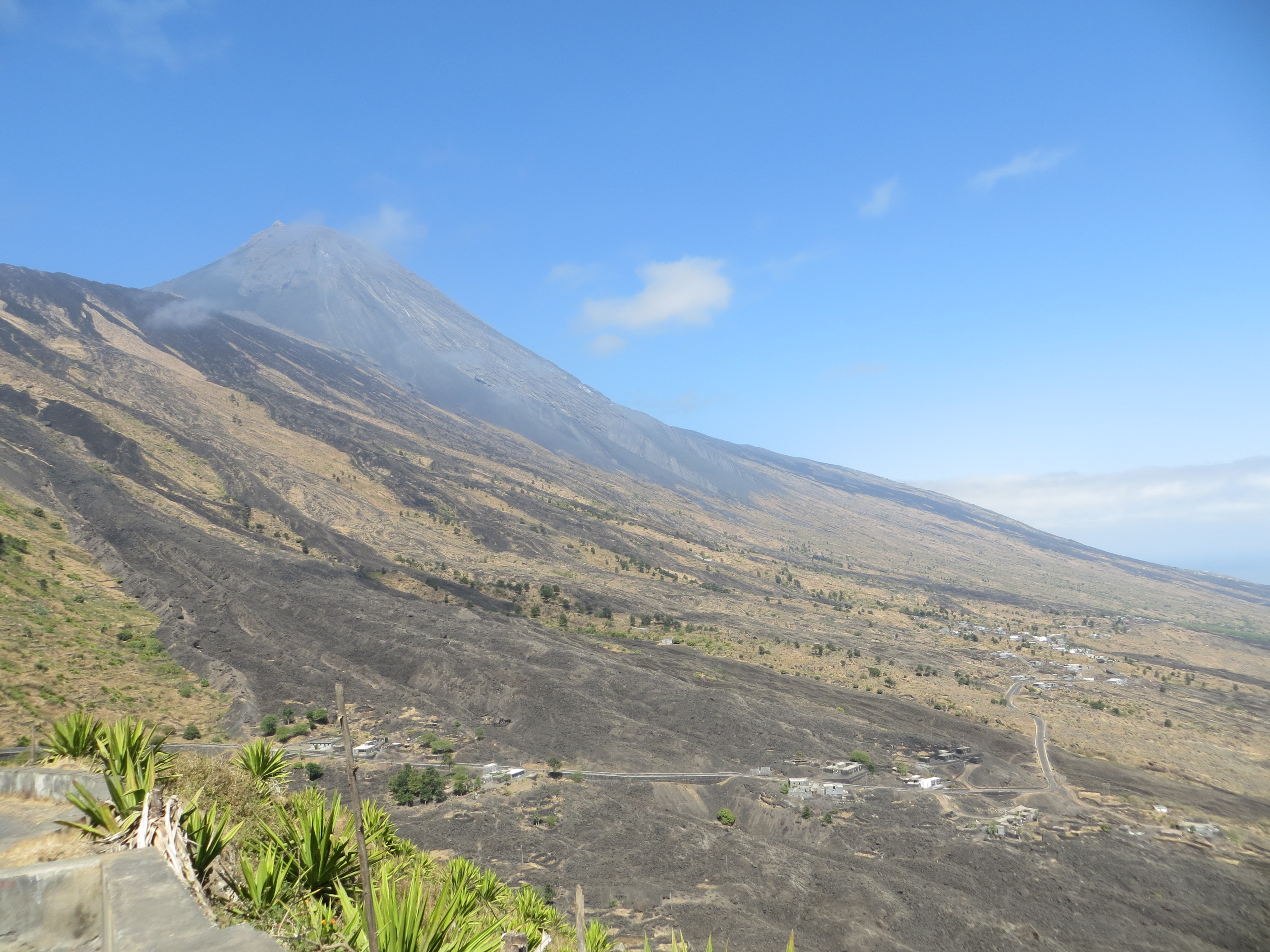 Landschaft auf Fogo